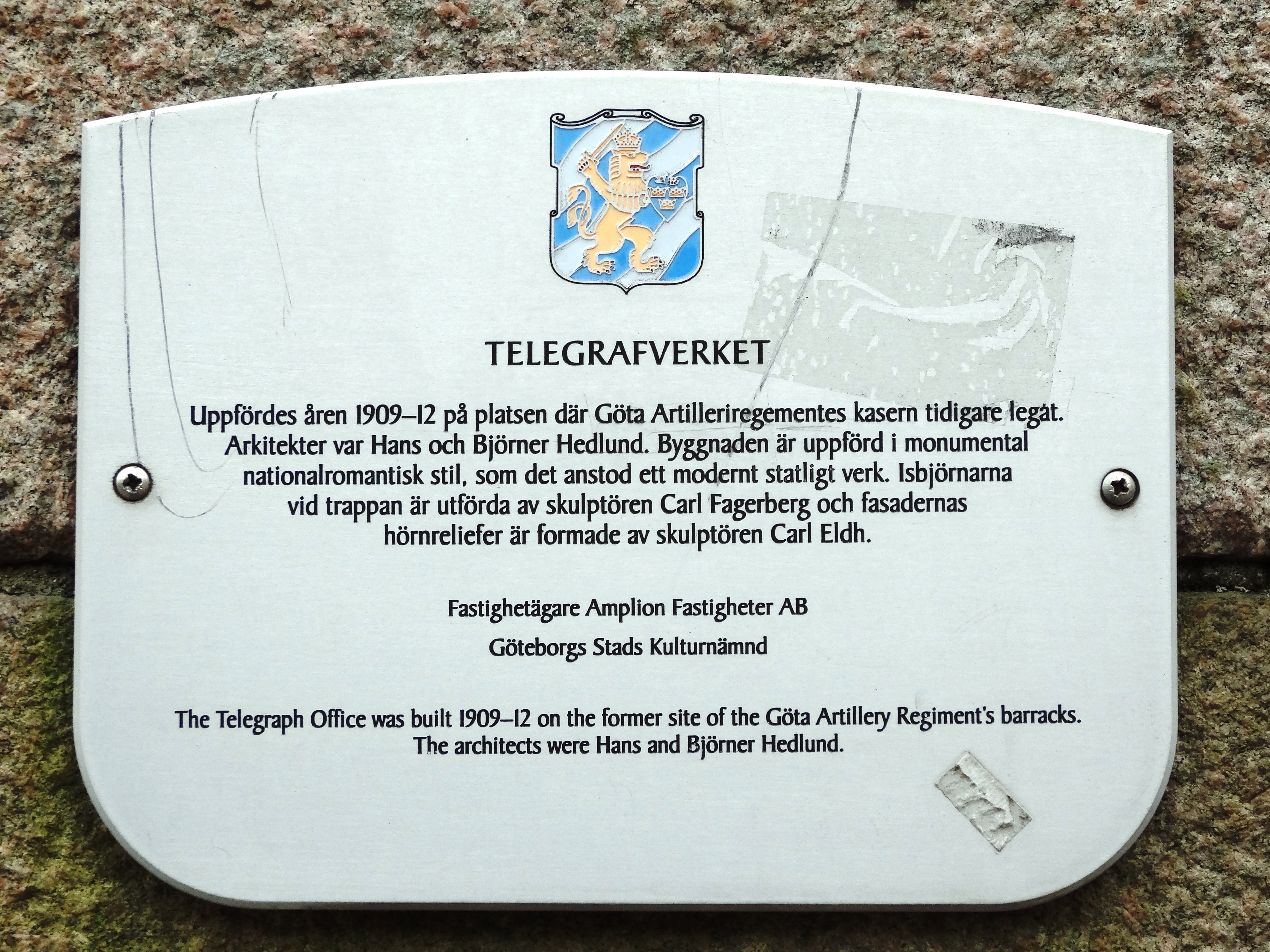 Televerkets hus i Göteborg. Plaketten sattes upp som en del av Göteborgs stads kulturnämnds "Projekt Husmärkning" kring åren 2000-2001 där drygt etthundra skyltar ingick. Se även boken "100 utmärkta hus i Göteborg". Vid en inventering av kommunen gjord 2016 satt 69 skyltar fortfarande uppe.